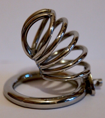 Le meilleur modèle de cage de chasteté métal française faîte sur mesure par un artisan.